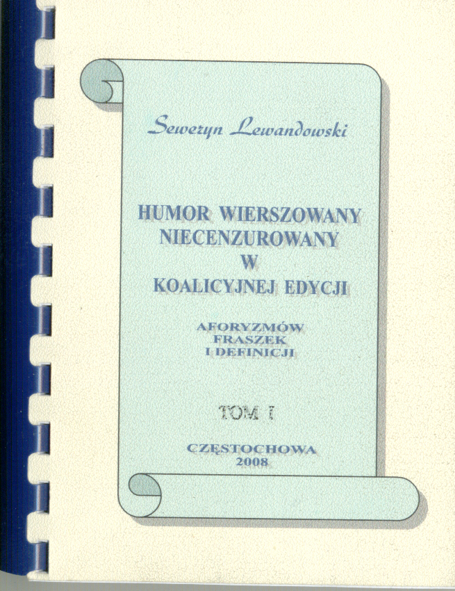 Humor wierszowany ... Tom I